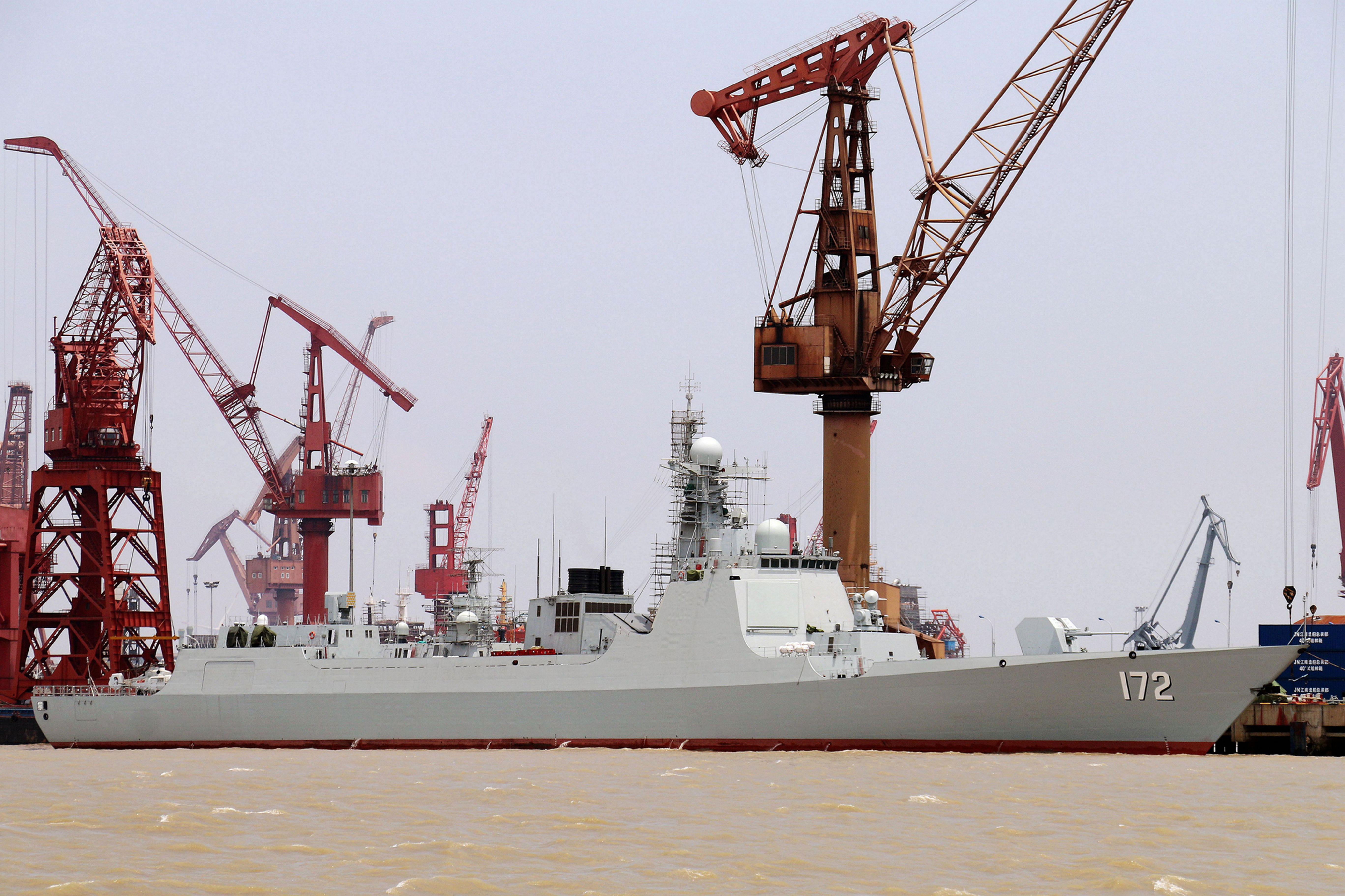 中文（中国大陆）: 停靠在长兴岛港口的“昆明”号导弹驱逐舰。